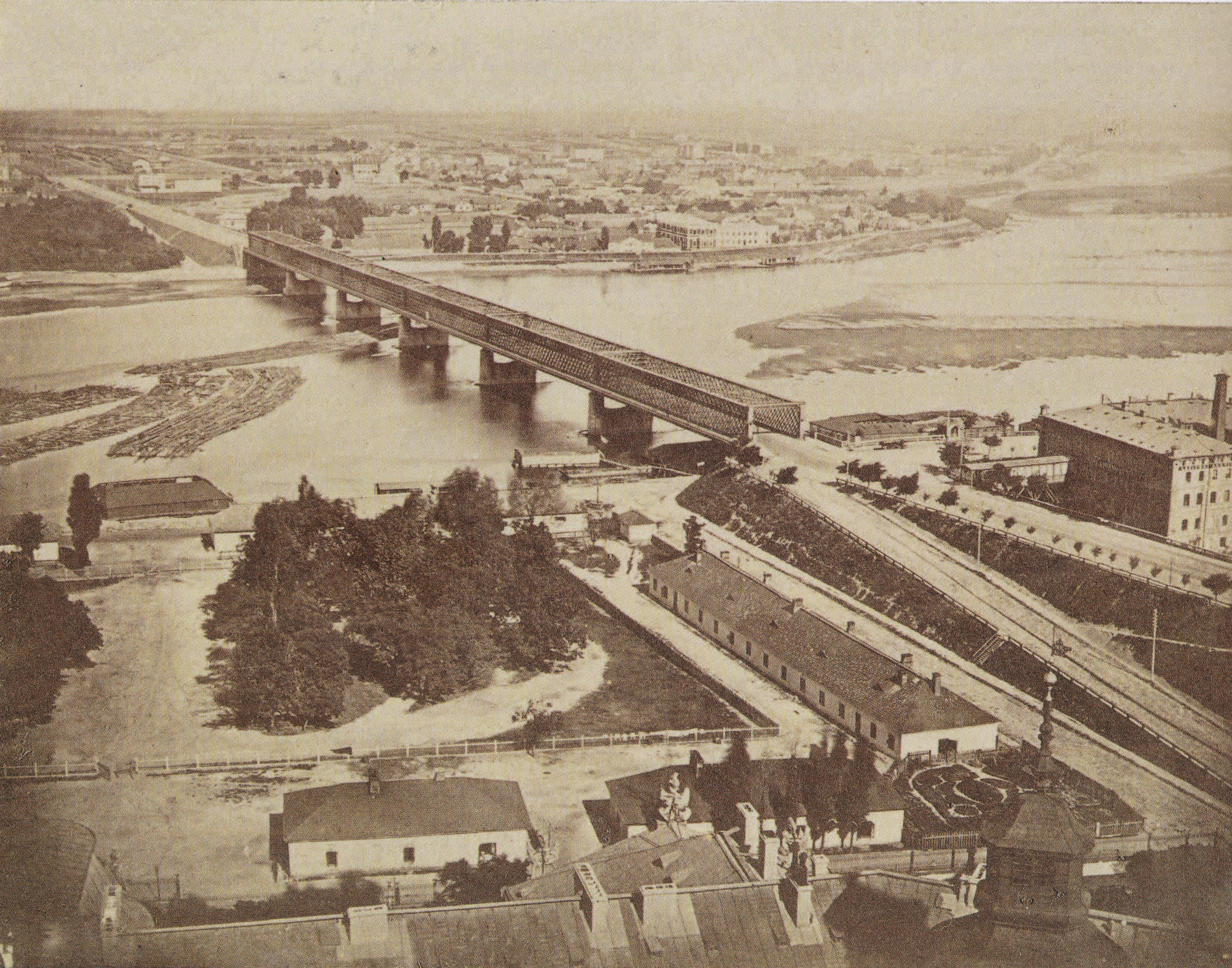 Fragment panoramy Warszawy z wieży Zamku Królewskiego w Warszawie